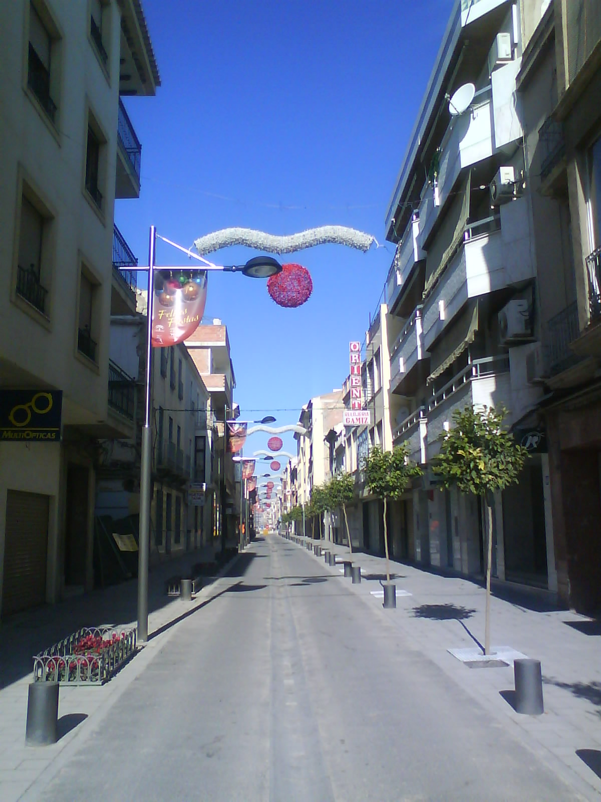 Vista general de la Calle Ancha, principal eje de Huétor-Tájar (Granada, España) y zona comercial